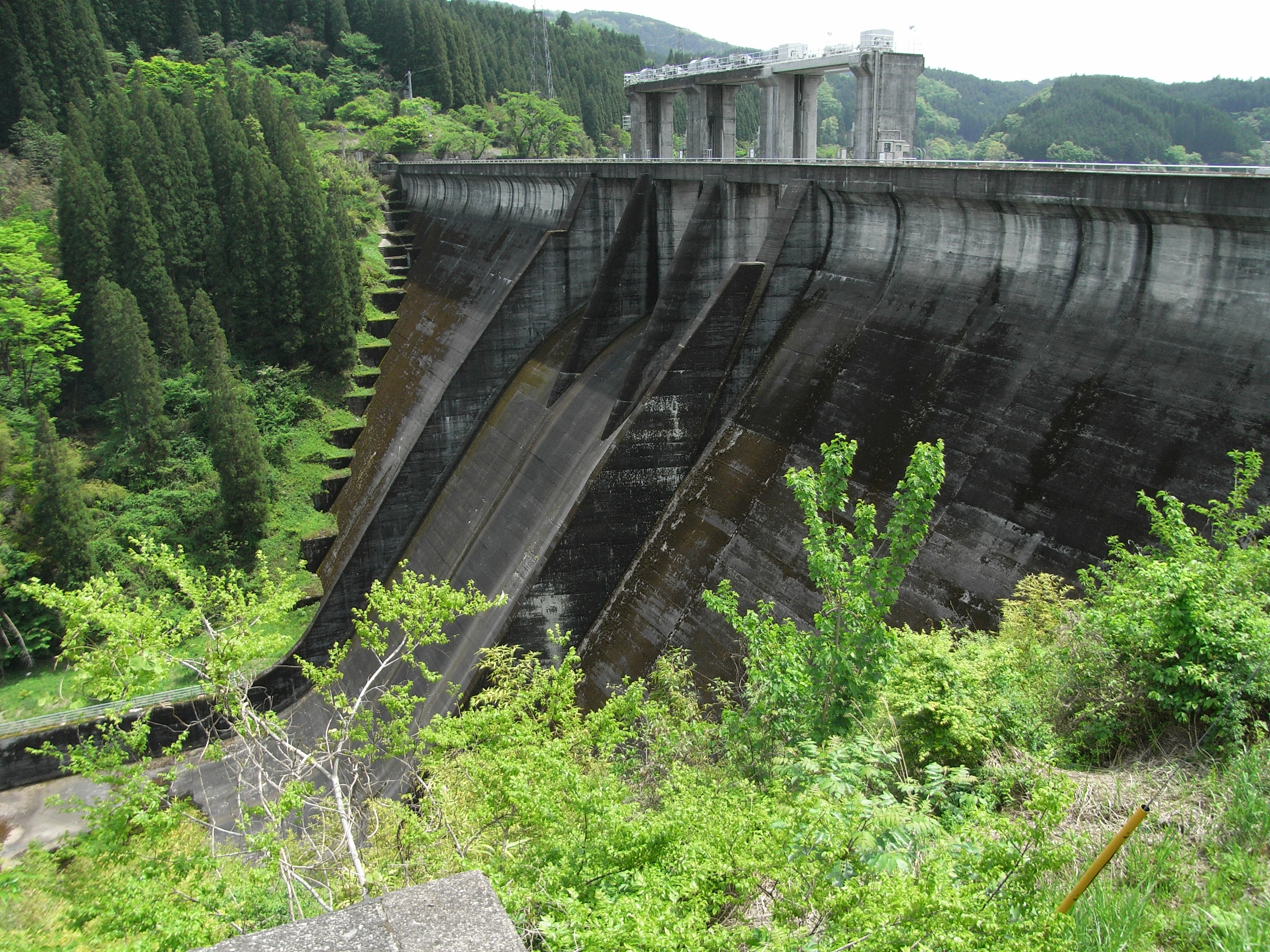 Dam